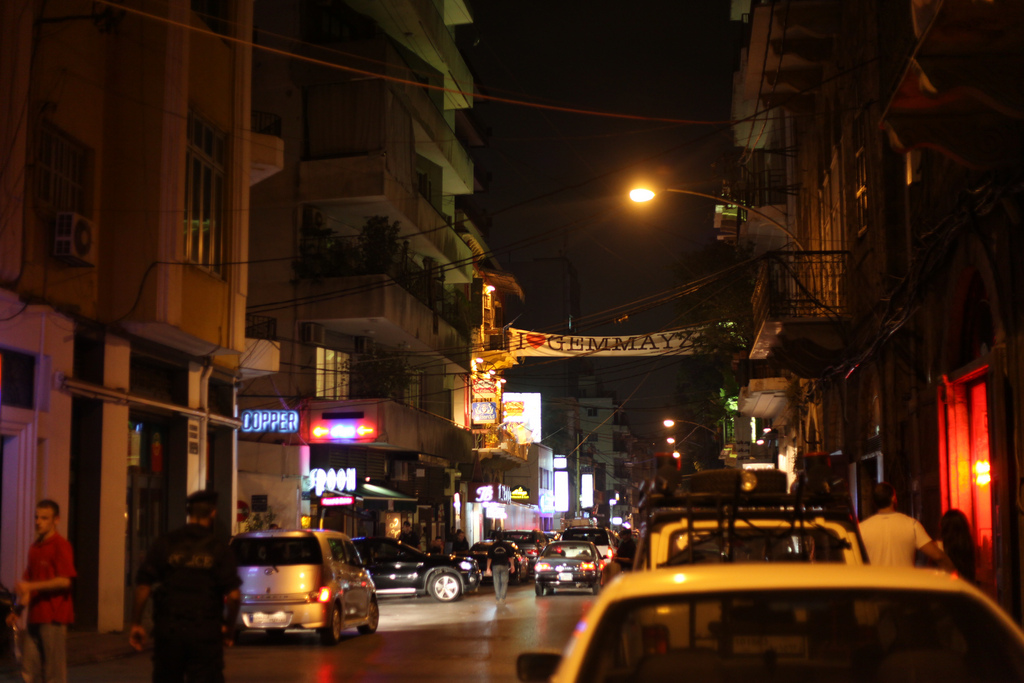 Credit: Dania Bdeir